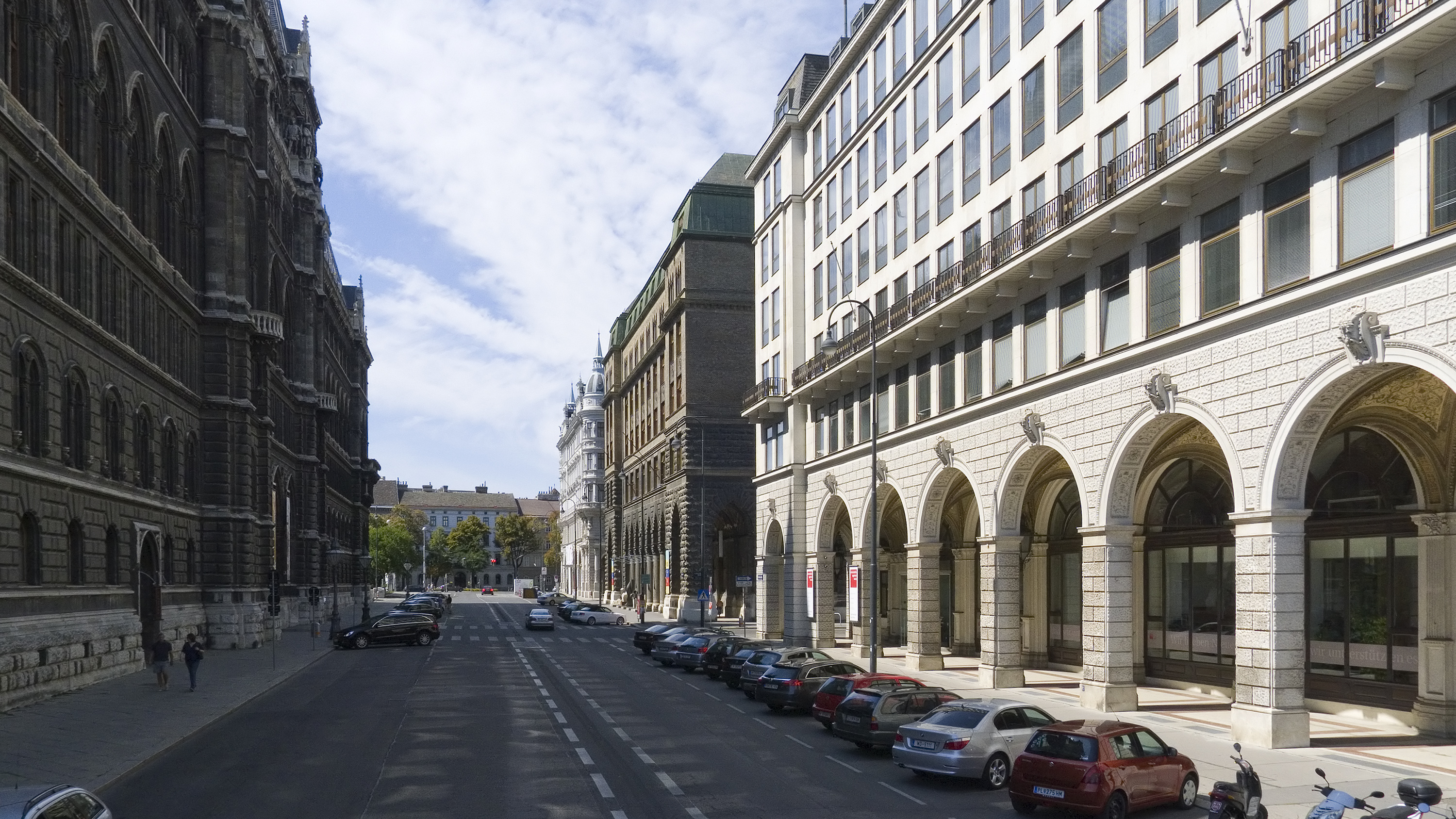 Felderstraße in Wien 1 bei Nr. 2 Richtung Westen